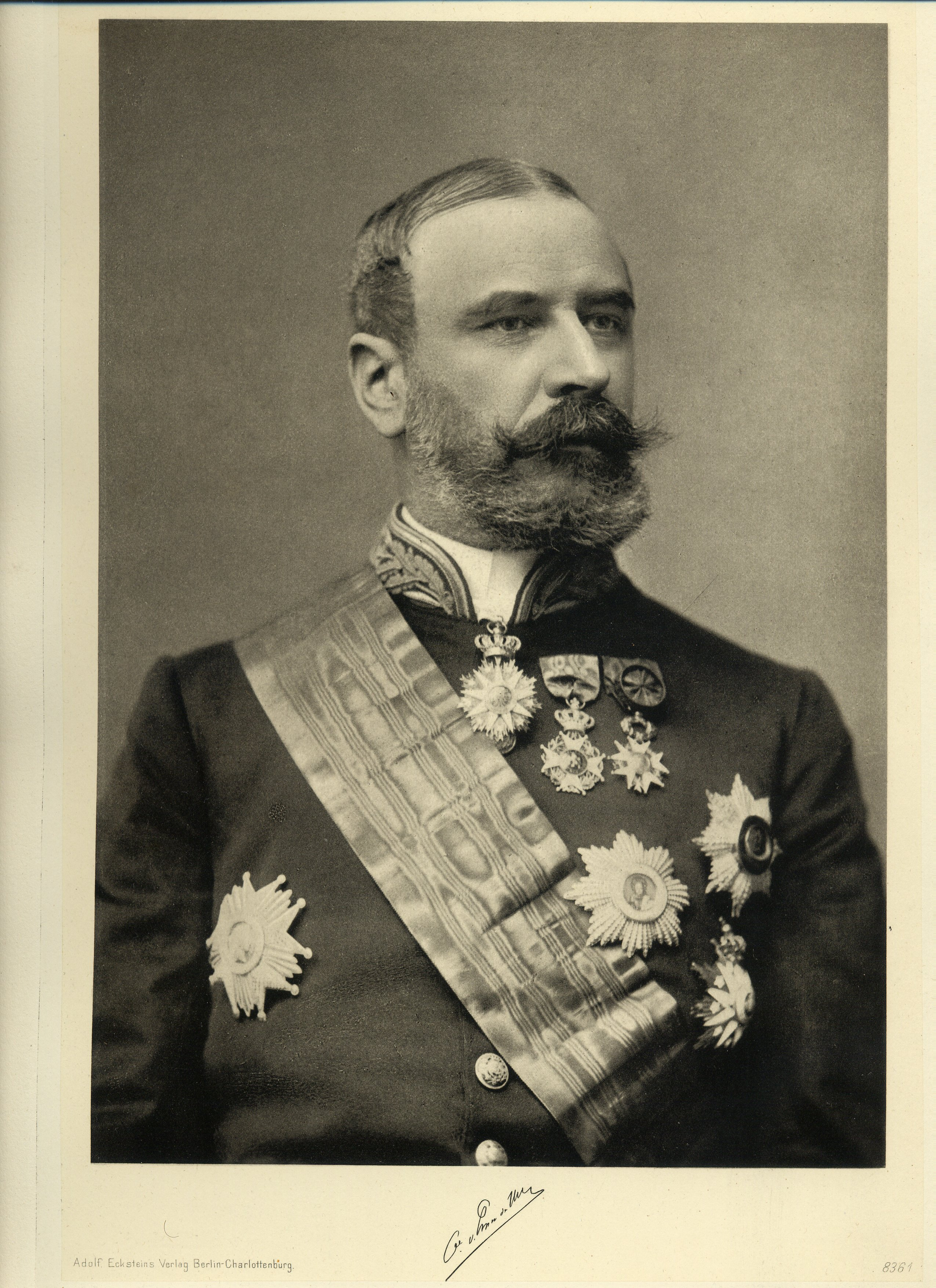 Portrait de Paul de Smet de Naeyer vers 1900 paru dans "La Belgique d'aujourd'hui", sous la direction de Gustave DELTOUR, Berlin-Charlottenburg, Adolf Eckstein, vers 1908.